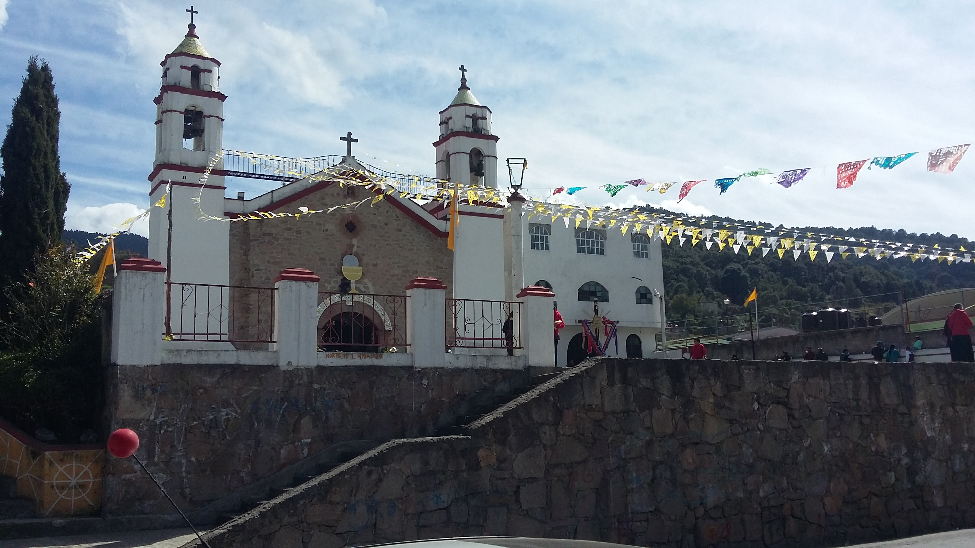 iglesia catolica dedicada a san francisco de asis reconstruida en 1920